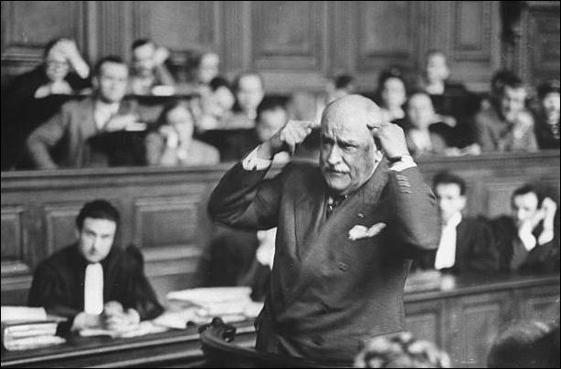 Le médecin légiste Charles Paul, dit le « docteur Paul », durant le procès de Marcel Petiot en 1946.